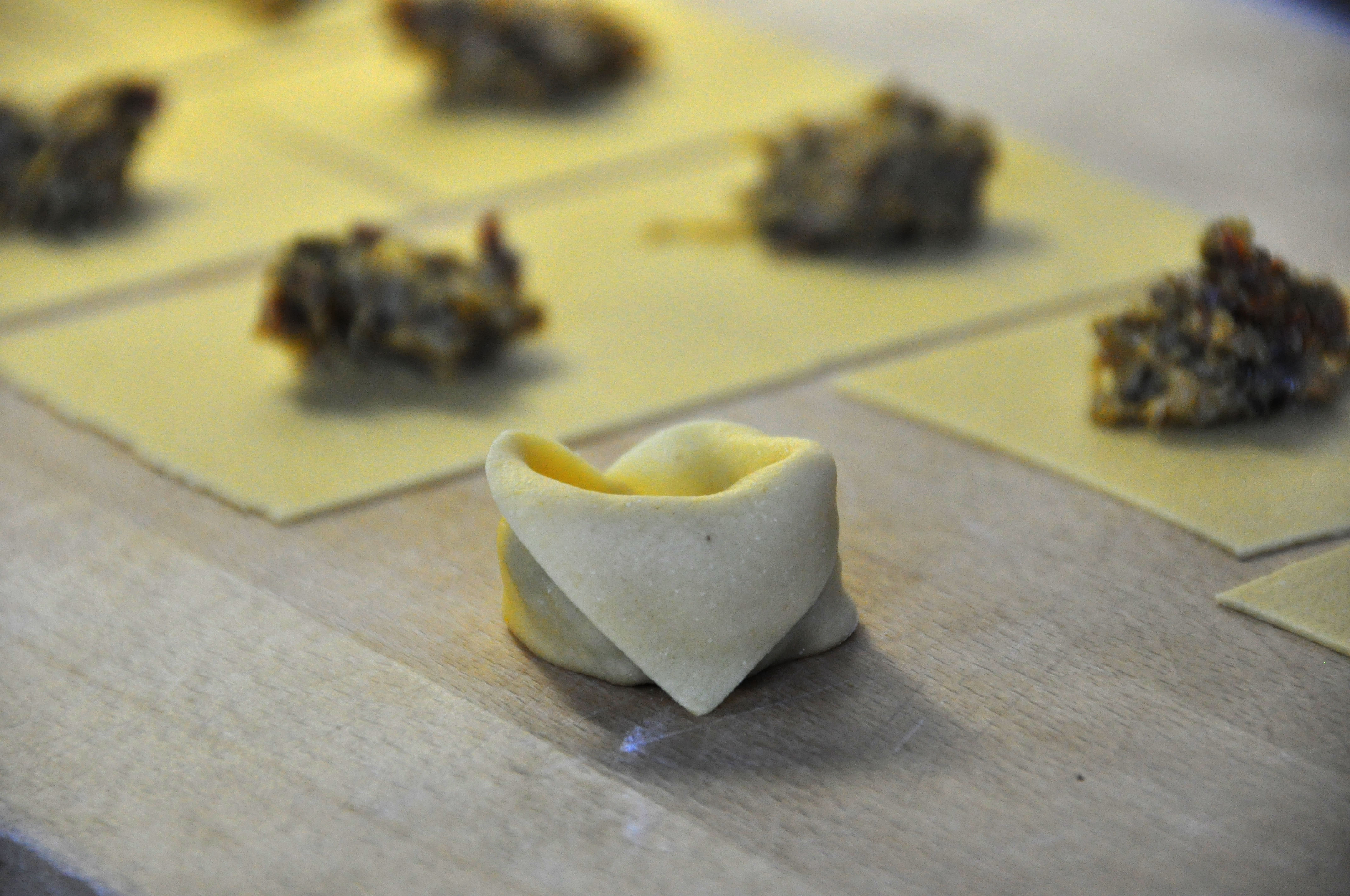 Inspiration: tortellini bolognesi